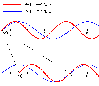 파원이 움직일때 파장은 어떻게 변하는가에대한 그래프